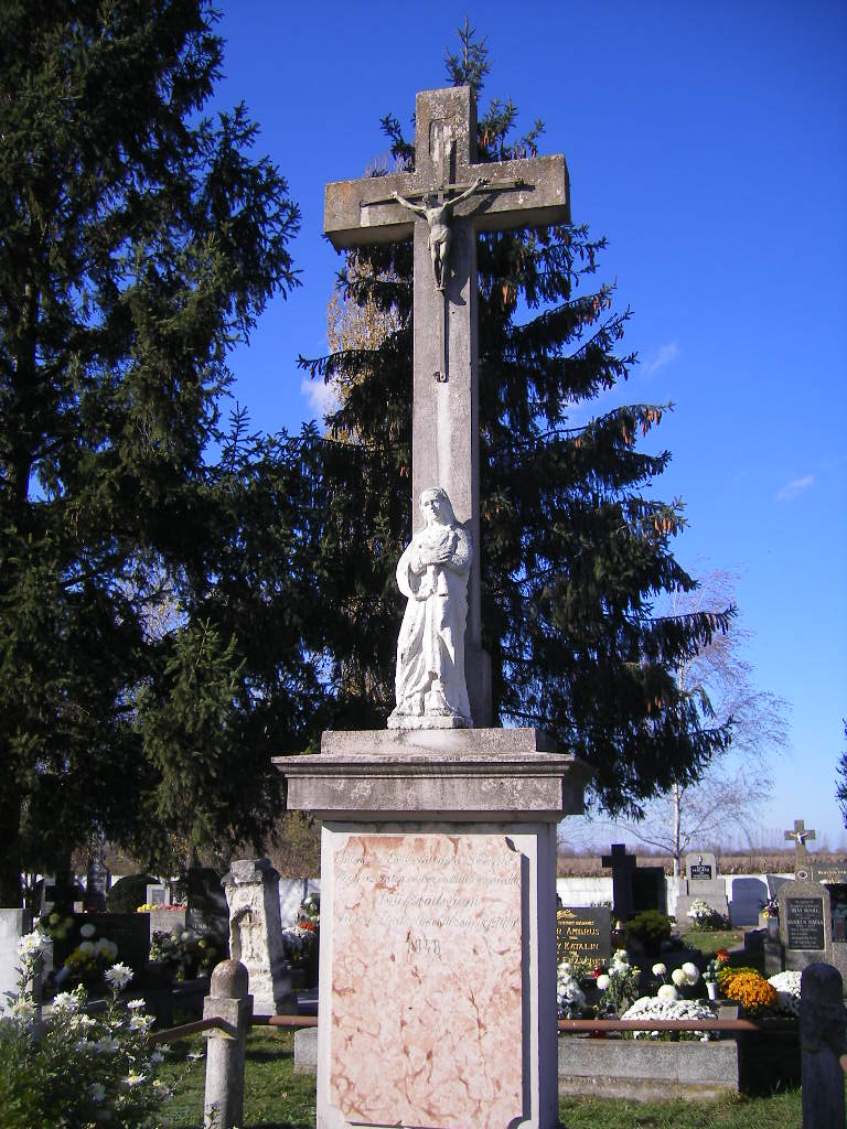 Csilizradvány - kereszt a temetőben